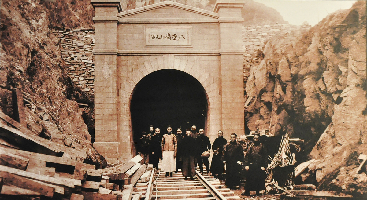 八达岭隧道竣工时工程人员合影